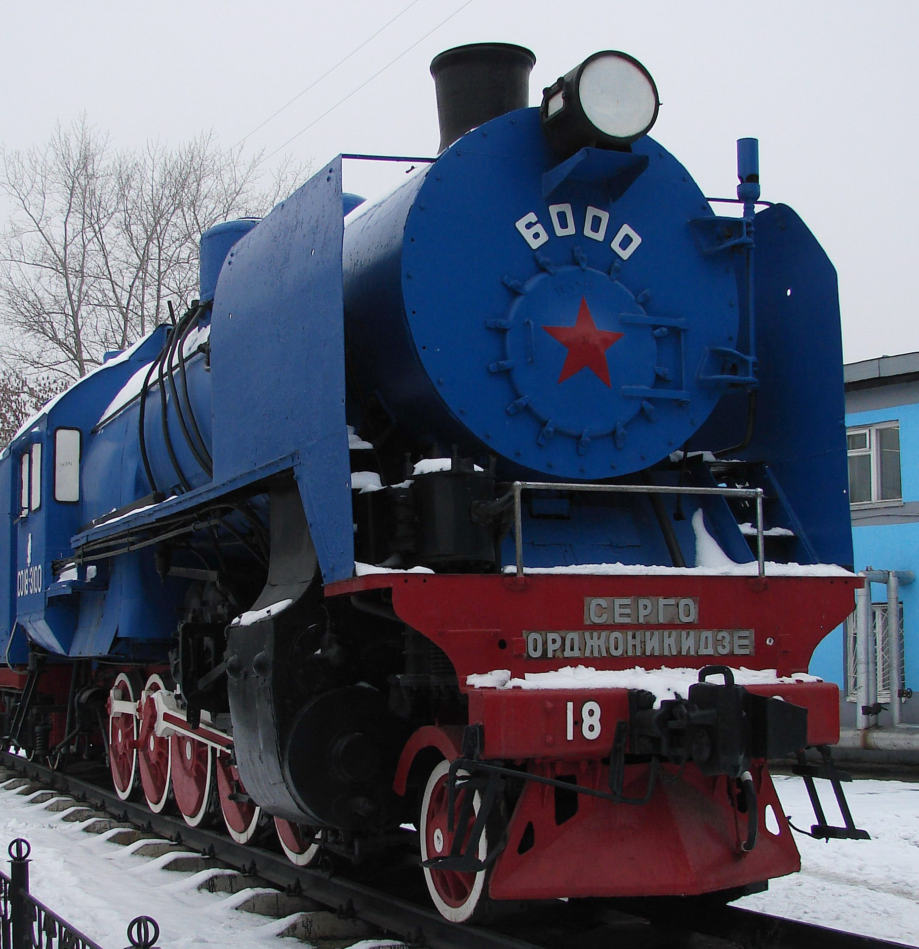 паровоз серии СО